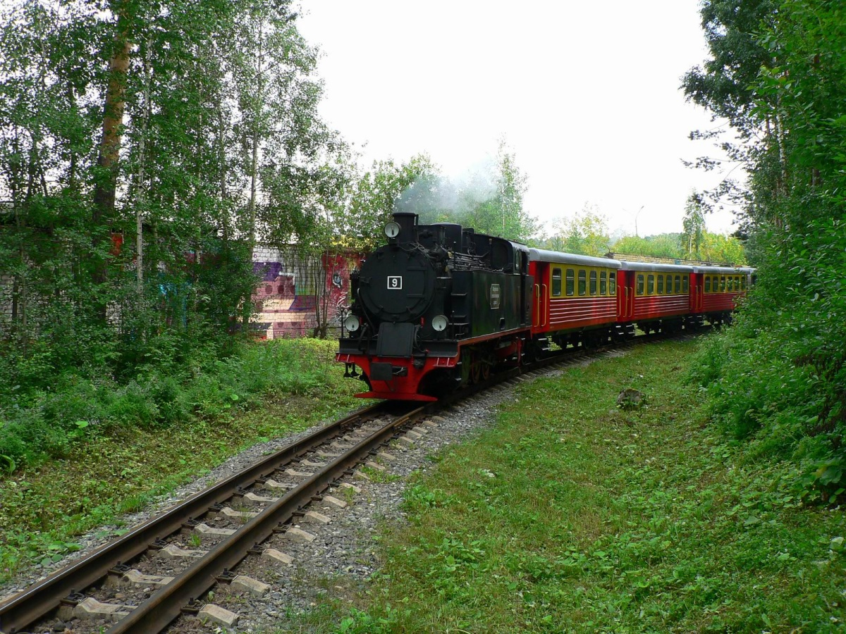 Паровоз O&K №12350 (№9) с пассажирским поездом на перегоне Юбилейная - Солнечная